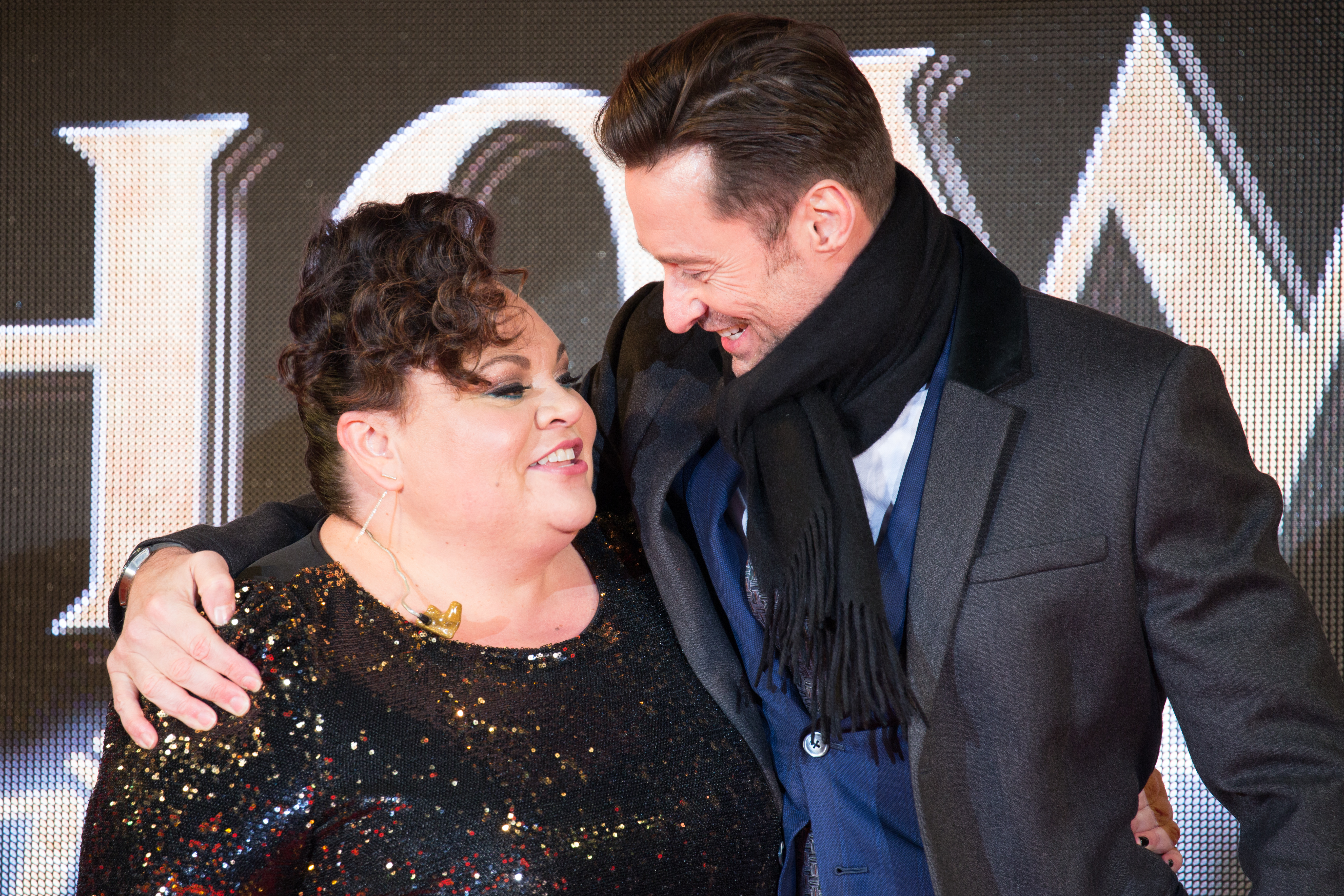 グレイテスト・ショーマン ジャパン・プレミア レッドカーペット ヒュー・ジャックマン キアラ・セトル